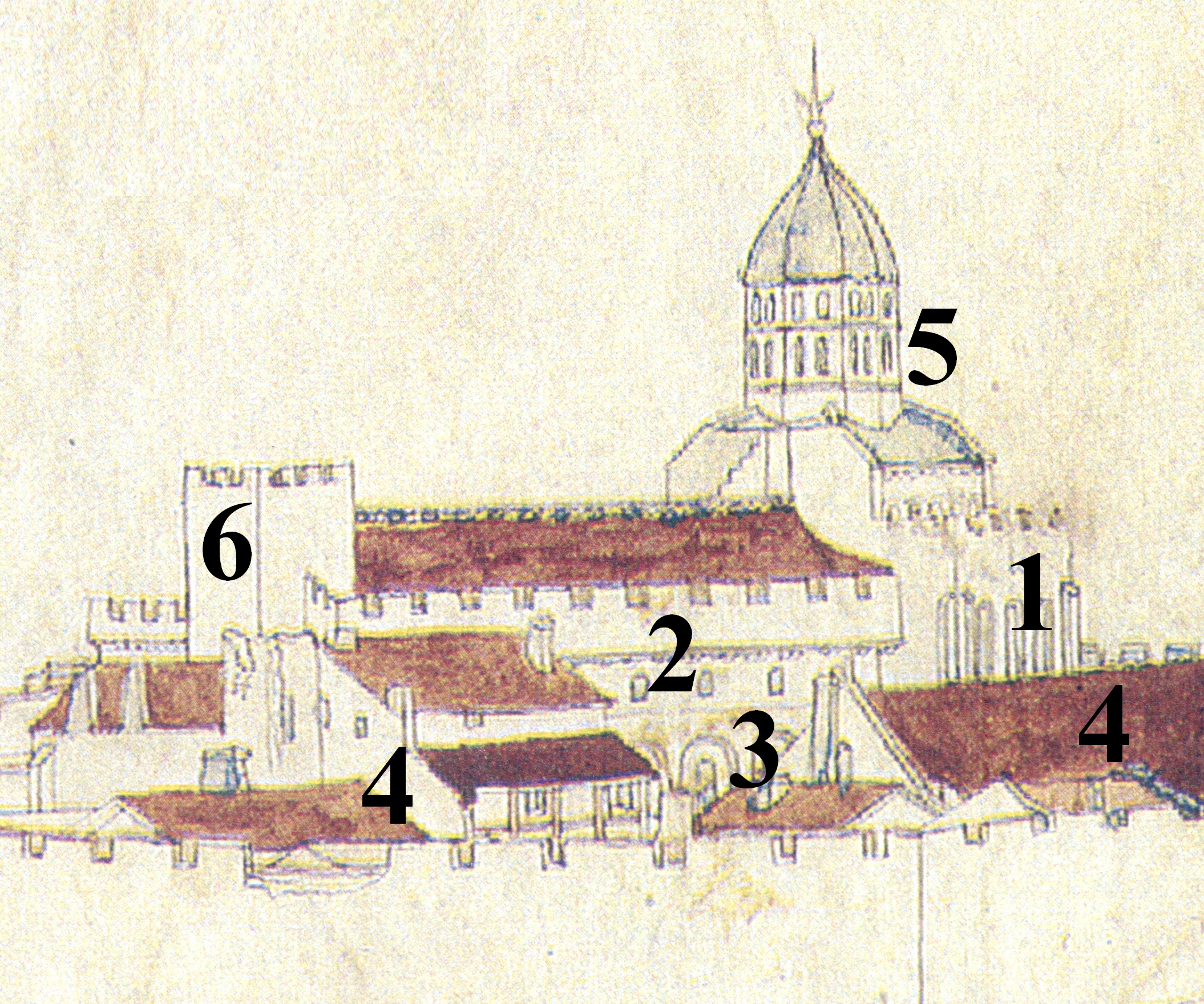 L'abbaye de Mozac, vue du sud-ouest, dessinée vers 1450 par Guillaume Revel pour son Armorial d'Auvergne.